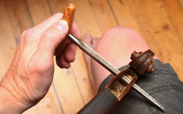 Brosjing av skruehull